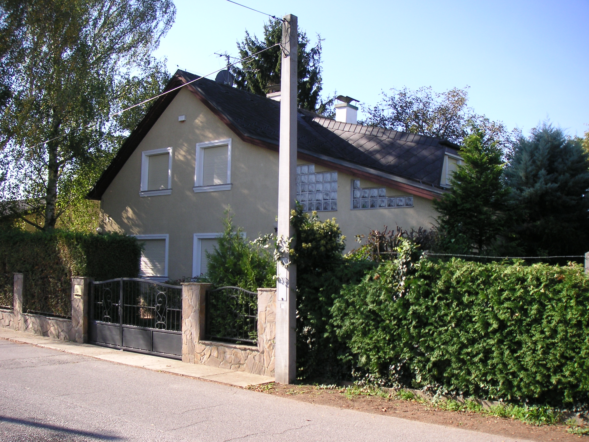 das Haus von Wolfgang Priklopil in Strasshof an der Nordbahn, in dem Natascha Kampusch festgehalten wurde